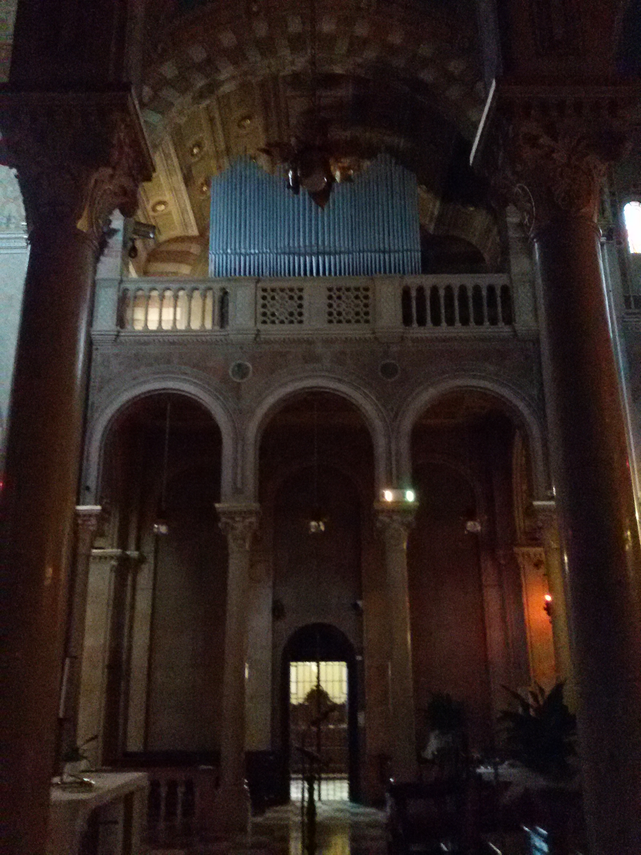 organo